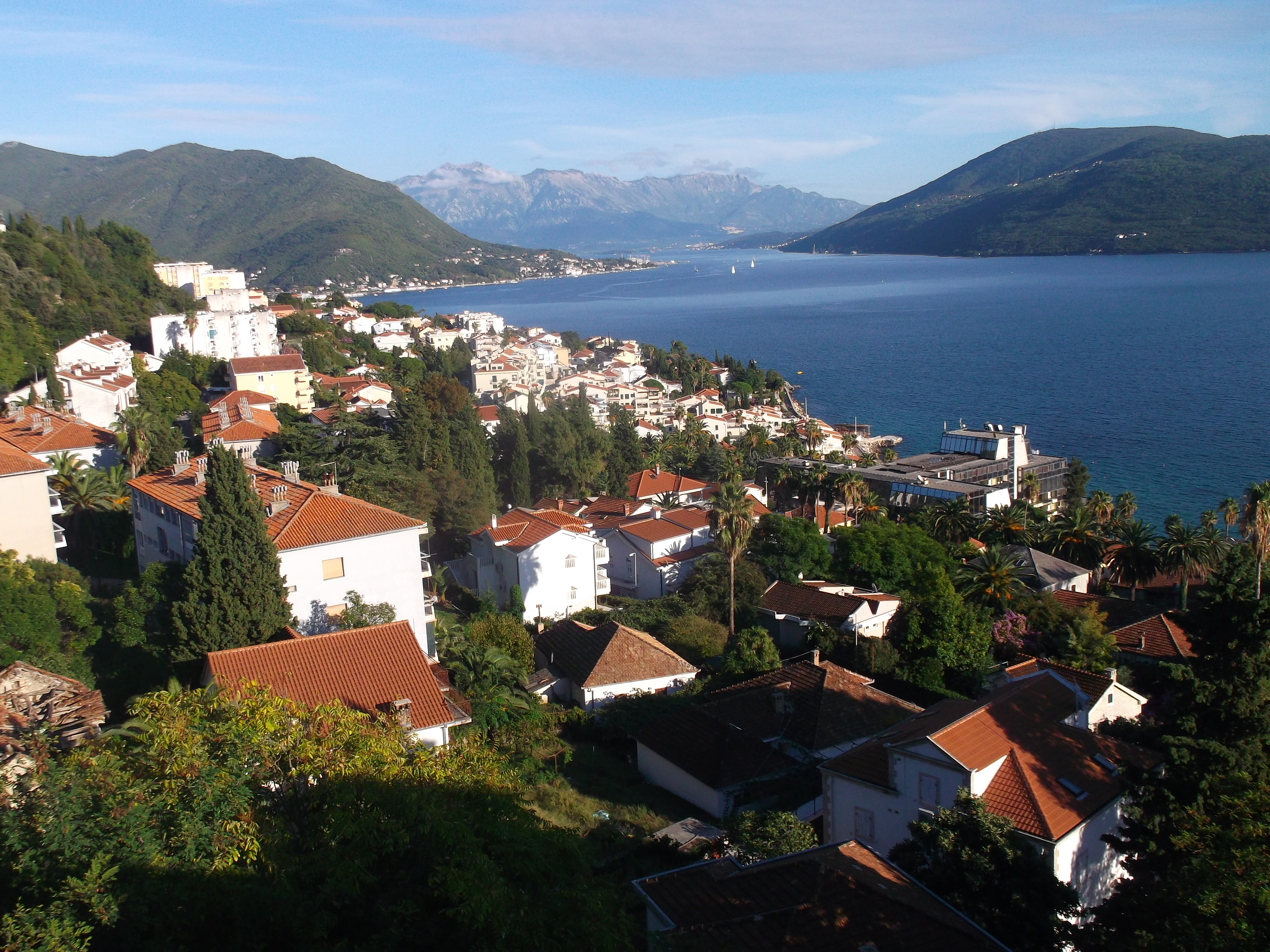 Herceg Novi, Montenegro